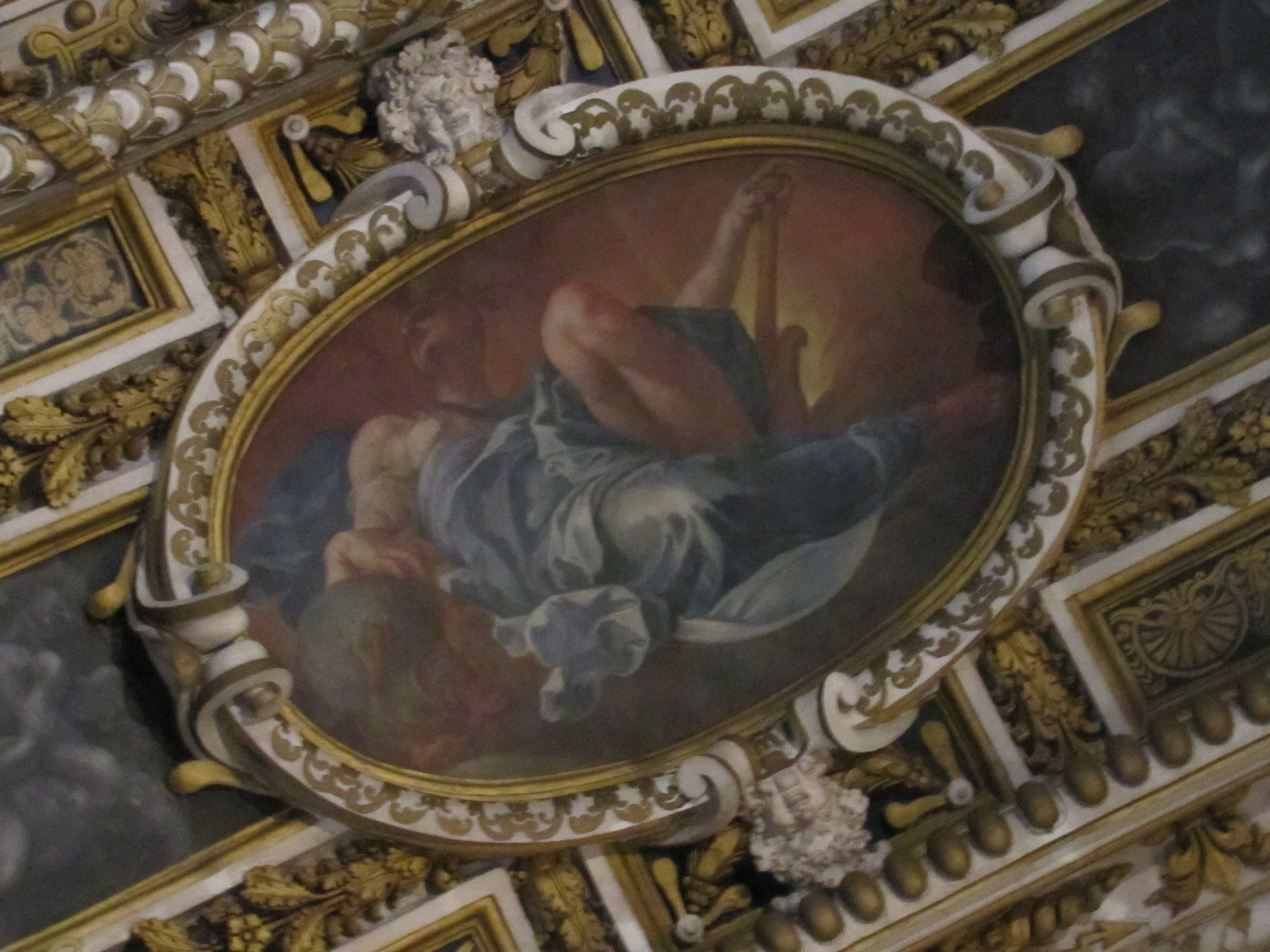 Martin Fréminet, Le Feu ou l'Humeur Colérique, 1608 - 1619, Fontainebleau, musée national du château